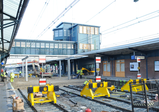 Ombouw van sporen 4 t/m 6 tot kopspoor te Groningen van de doorgaande sporen 4, 5 en 6 tot kopspoor 4A, 5A en 6A en de kopspoor 4B, 5B en 6B (stand op 5 december 2010).